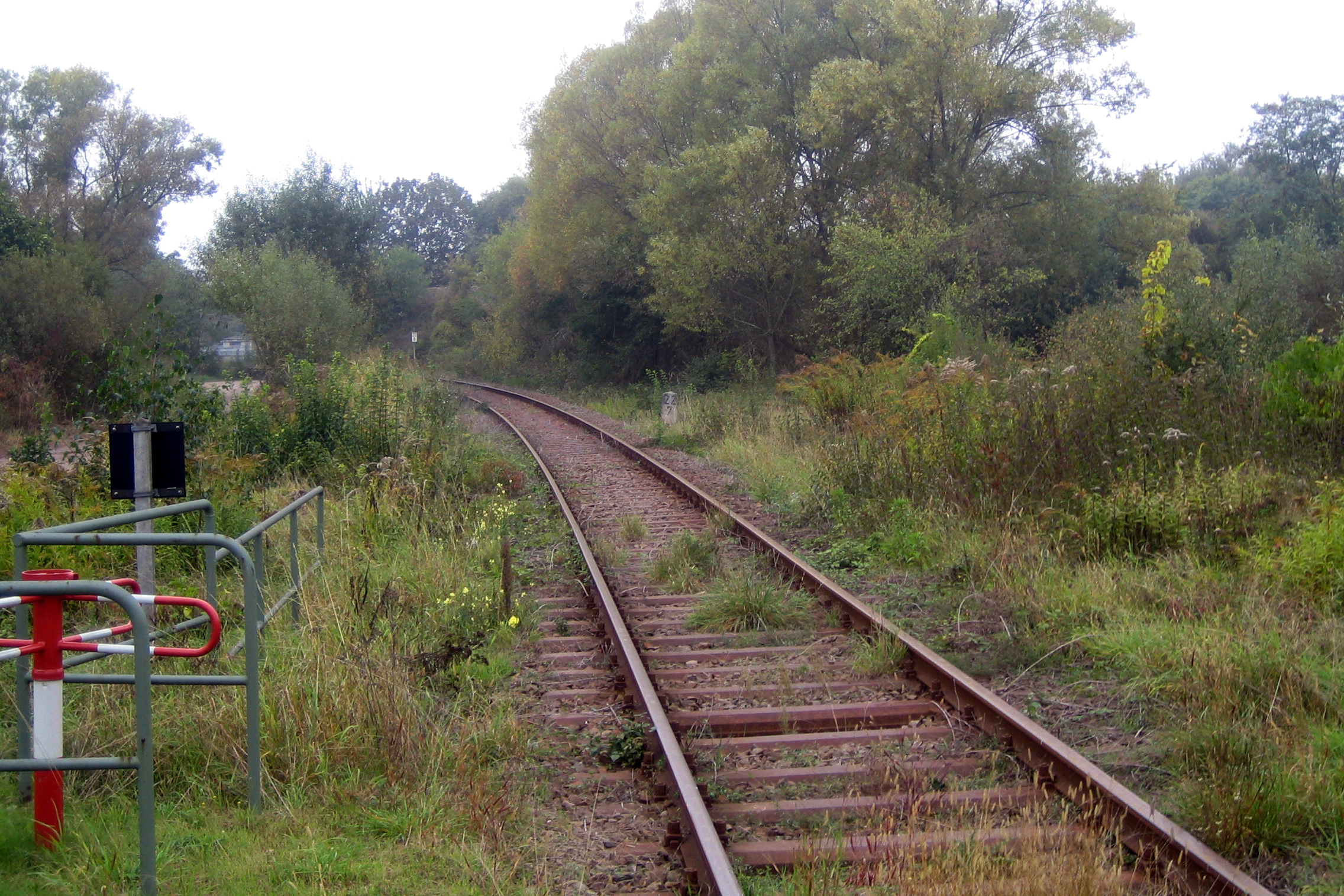 Streckenabschnitt der Unteren Queichtalbahn zw. Landau und Dammheim, Richtung Landau